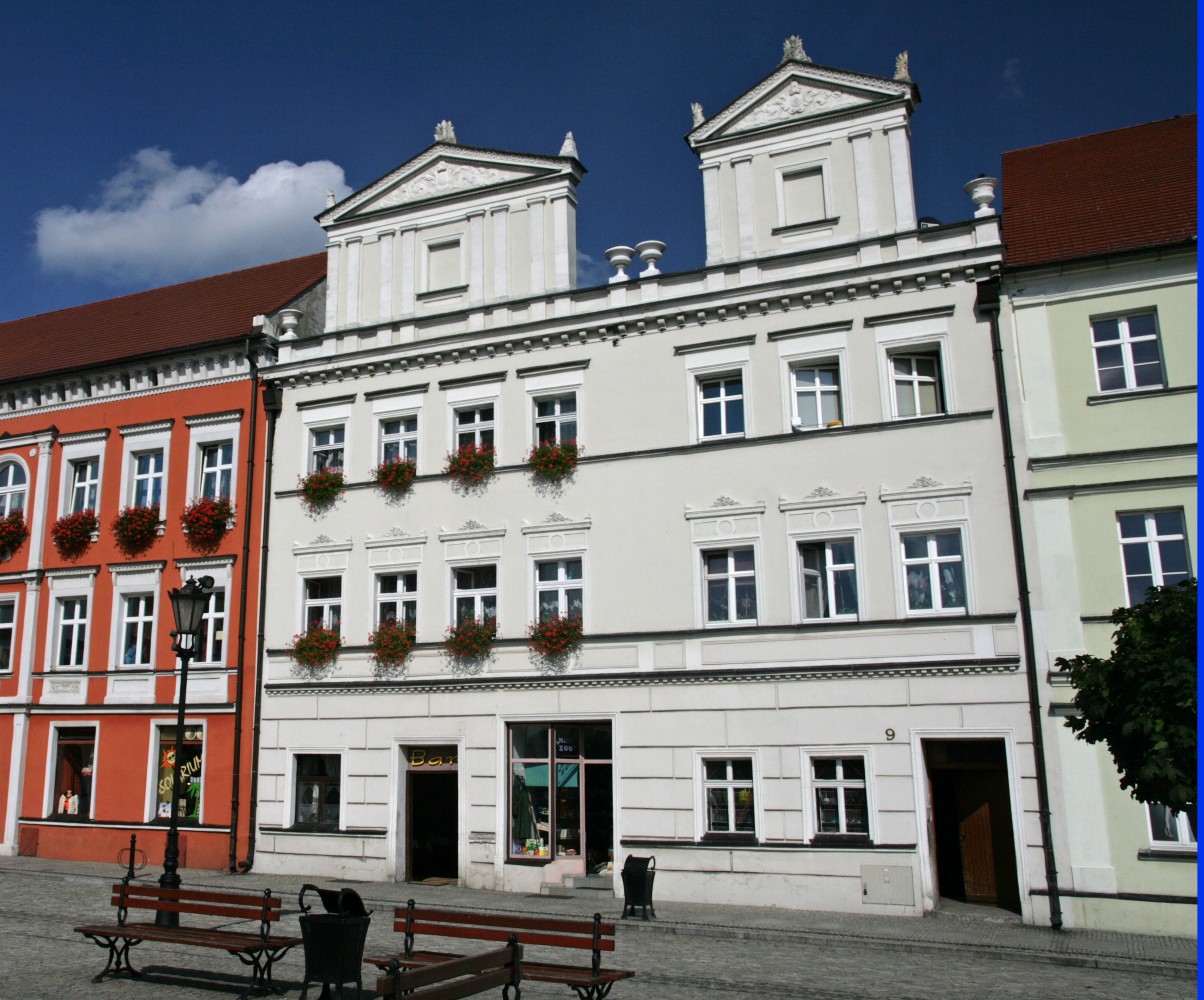 Dom, mur., XVII/XVIII, pocz. XIX Bytom Odrzański, Rynek 9, Bytom Odrzański 04.1963.